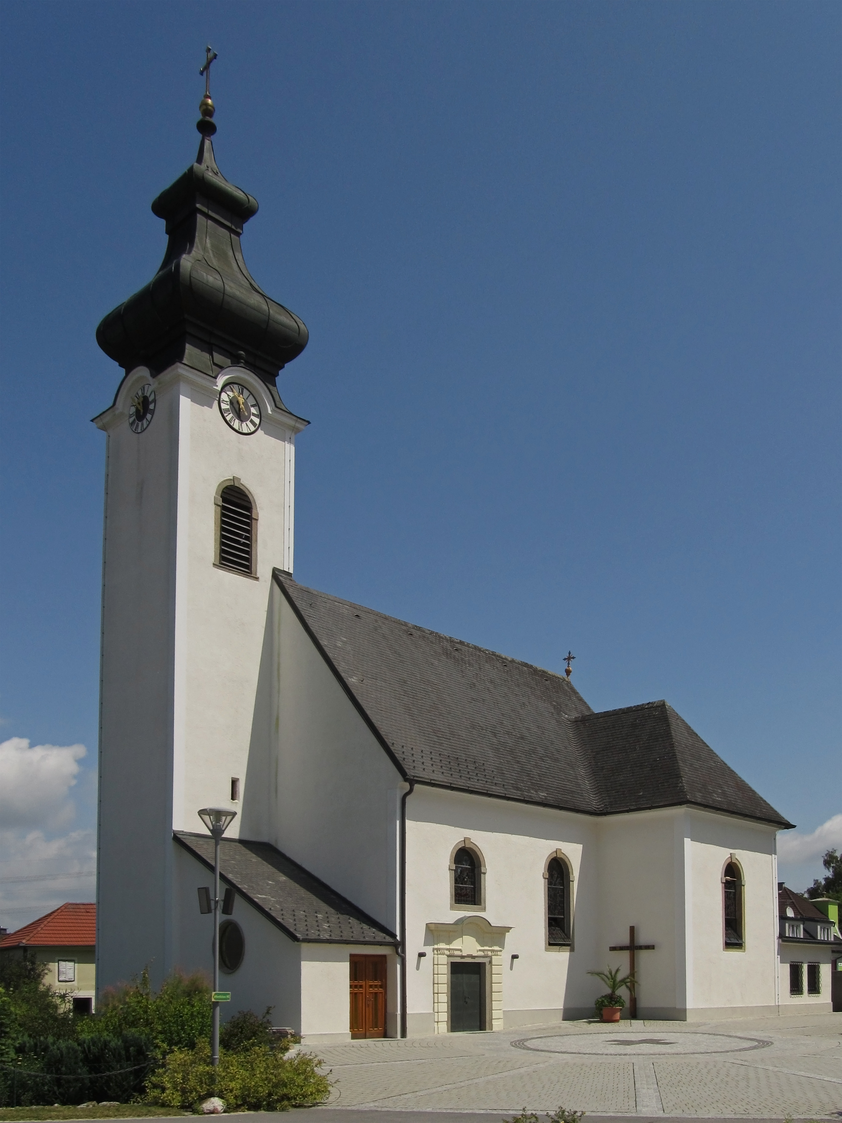 Eine barocke Saalkirche aus dem Anfang des 17. Jahrhunderts, die 1749 und 1965/66 umgebaut wurde.